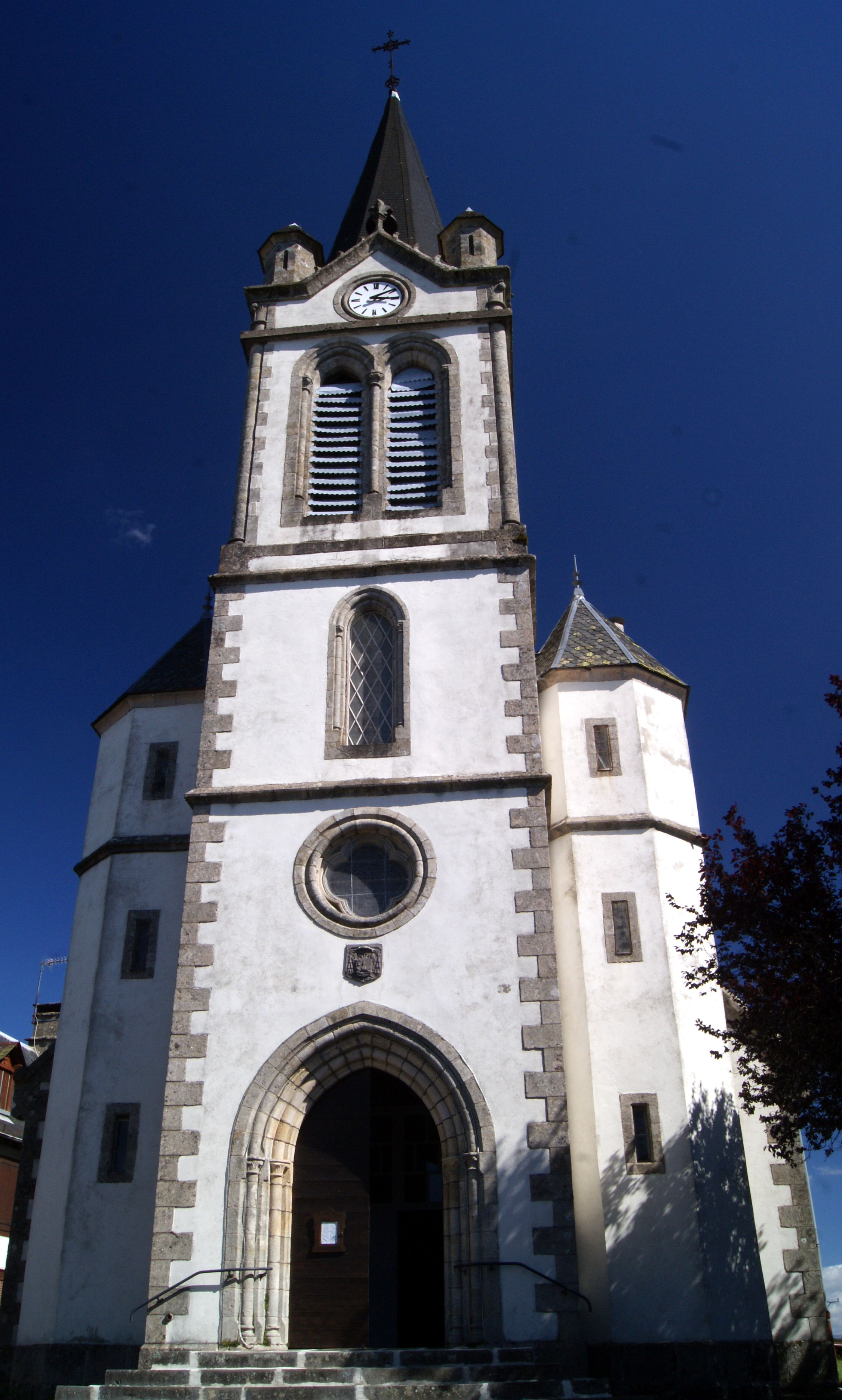 Eglise de Chaussenac